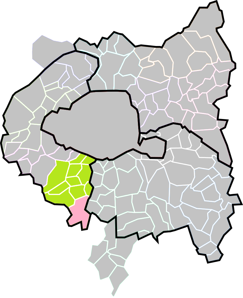 Localisation de la Communes d'Antony (Département des Hauts-de-Seine) au sein de l'Établissement Public Territorial de la Vallée Sud Grand Paris, adhérent à la Métropole du Grand Paris